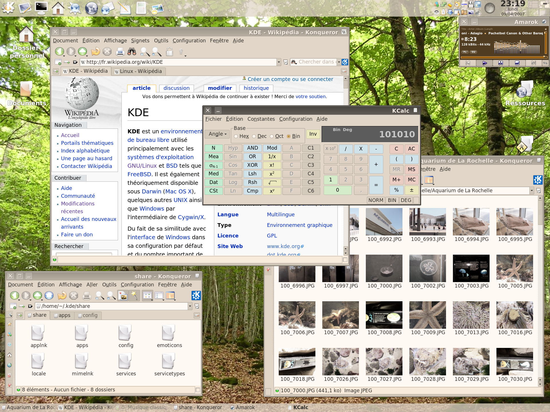 Capture d'écran d'une version personnalisée de l'environnement de bureau KDE (dans sa version 3.5.5) sous Linux, saveur Debian.